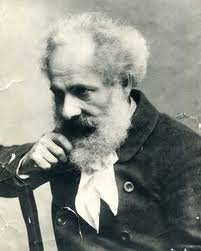 Художник Николай Васильевич Орлов (1863-1924)